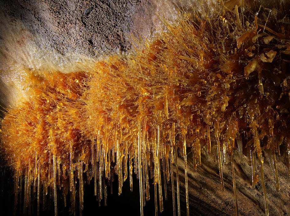 Geologia. Espeleotoemak Goikoetxe koban (Busturia, Bizkaia).